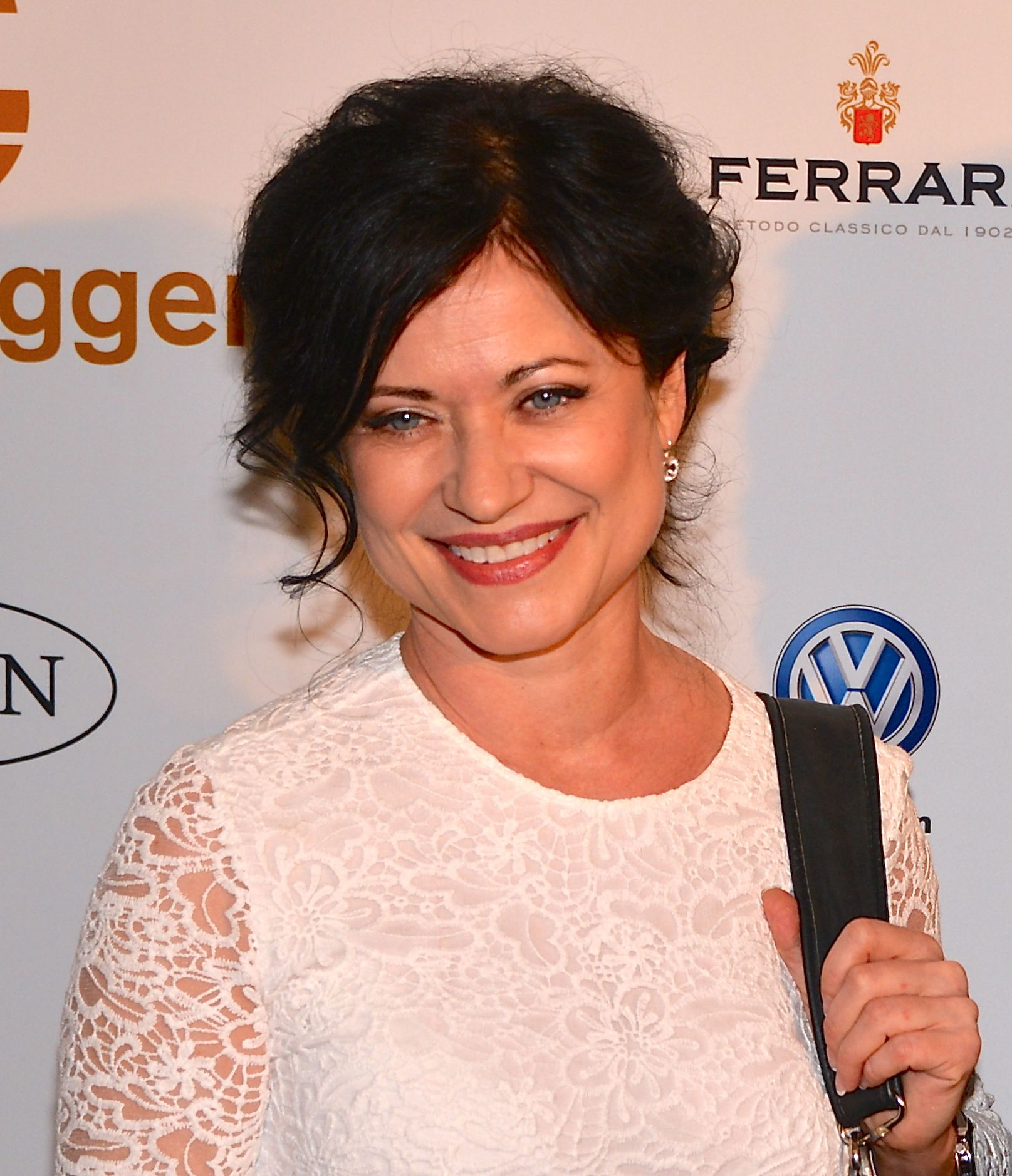 Lisbeth Åkerman på Guldbaggegalan den 21 januari 2013.